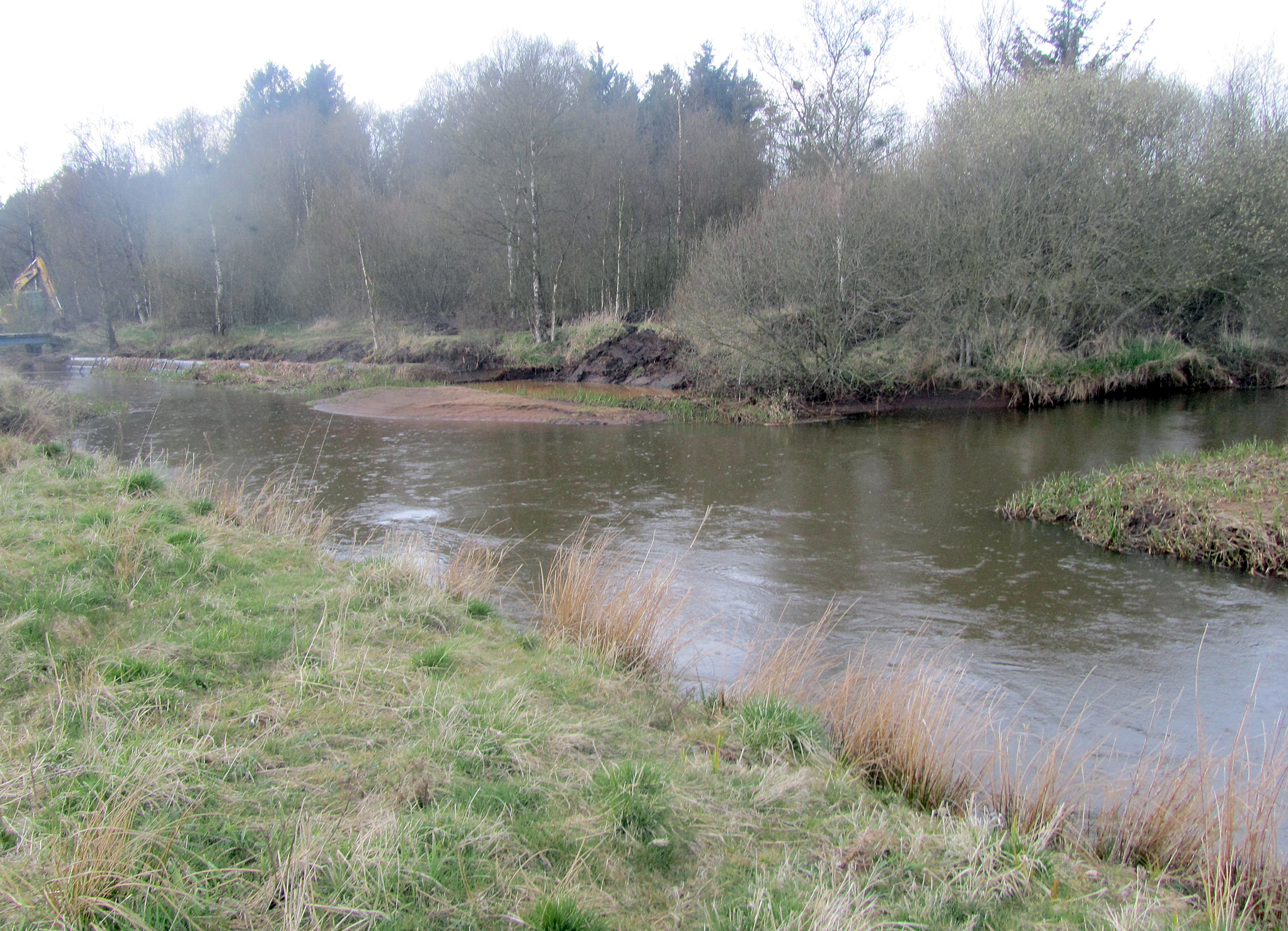 Rind Å ved indløbet til Dalgaskanalen (fjernest); Åen kommer fra højre og løber mod kameraet